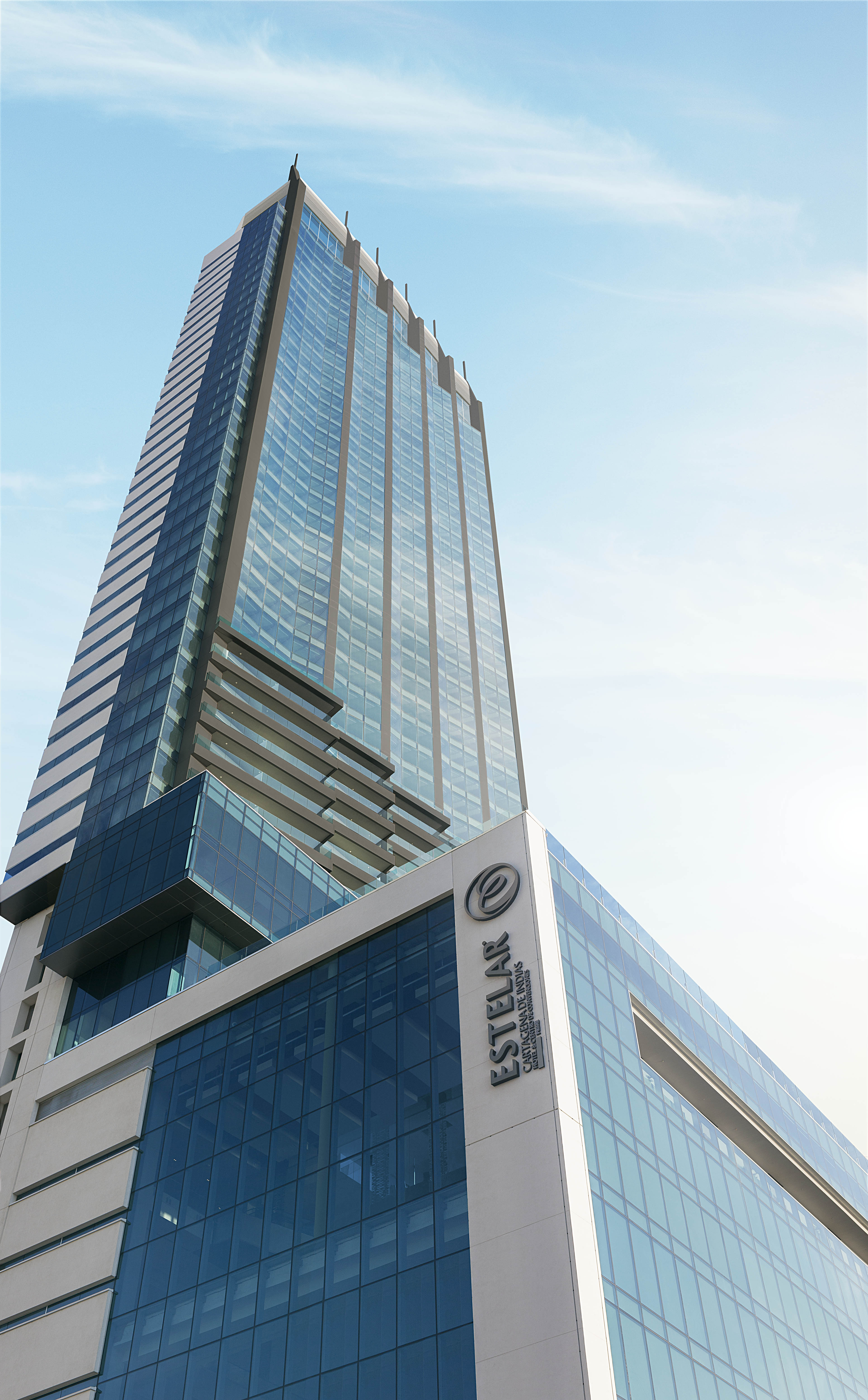 La fachada del Hotel ESTELAR Cartagena de Indias Hotel & Centro de Convenciones.